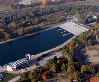 Stadium Plovdiv, Plovdiv Bulgaria